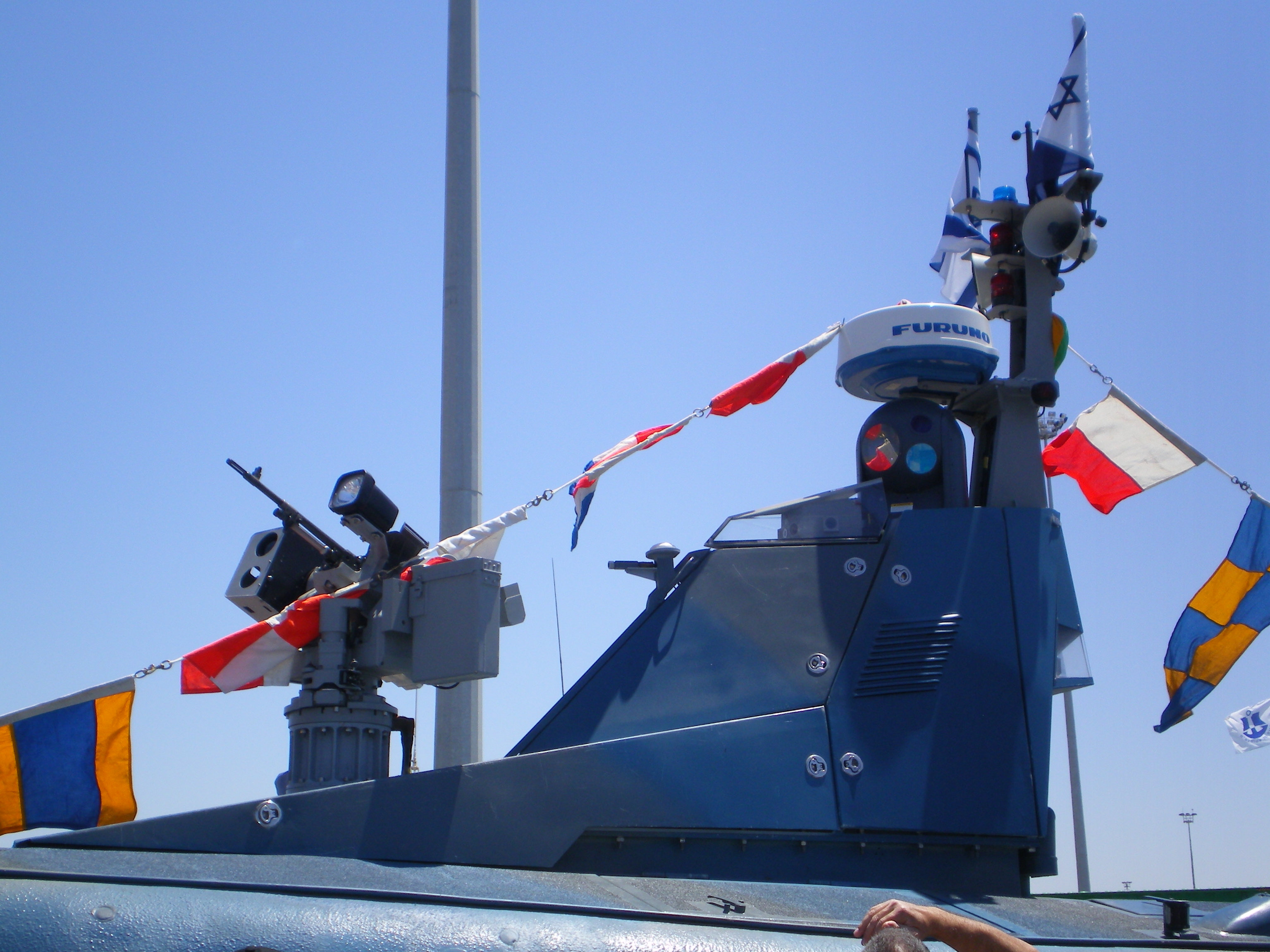 מטע"ד פרוטקטור